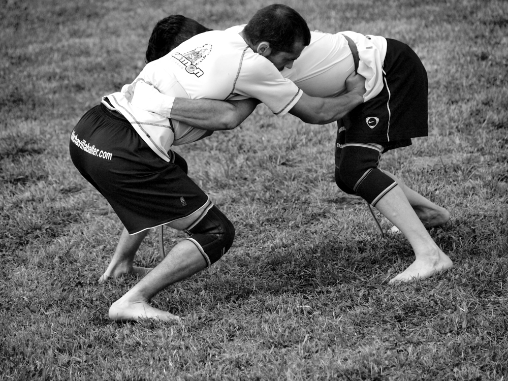 Corro de Lucha Leonesa Mata de Curueño León, España.